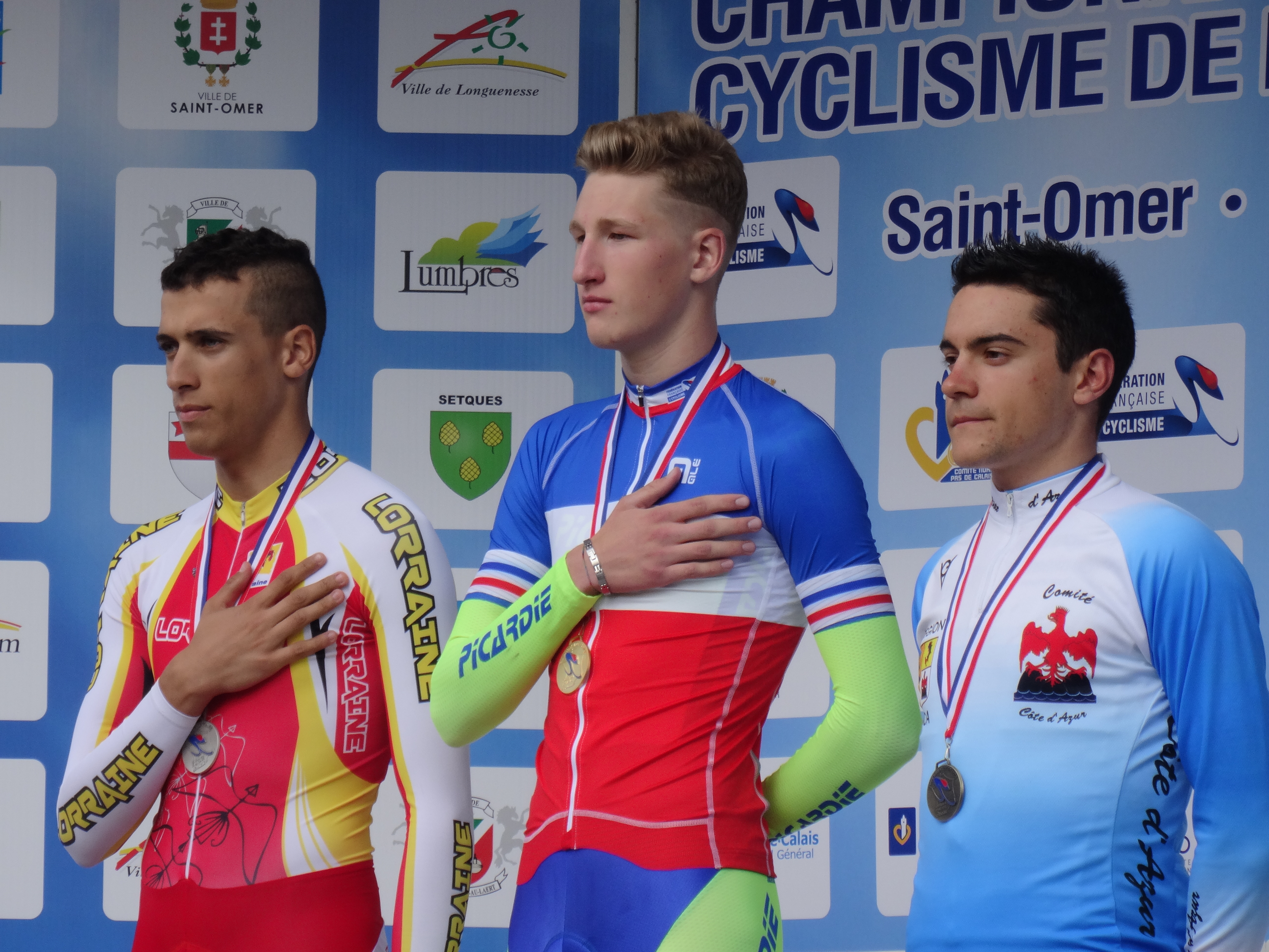 Reportage photographique réalisé le jeudi 21 août à l'occasion des Championnats de France de cyclisme sur route 2014 à Saint-Omer, Pas-de-Calais, Nord-Pas-de-Calais, France. La série A concerne le championnat de France du contre-la-montre juniors hommes, la série B le championnat de France du contre-la-montre espoirs hommes, la série C la remise des prix aux juniors hommes et la série D la remise des prix aux espoirs hommes. Depicted people: Rayane Bouhanni, Corentin Ermenault and Jérémy Defaye